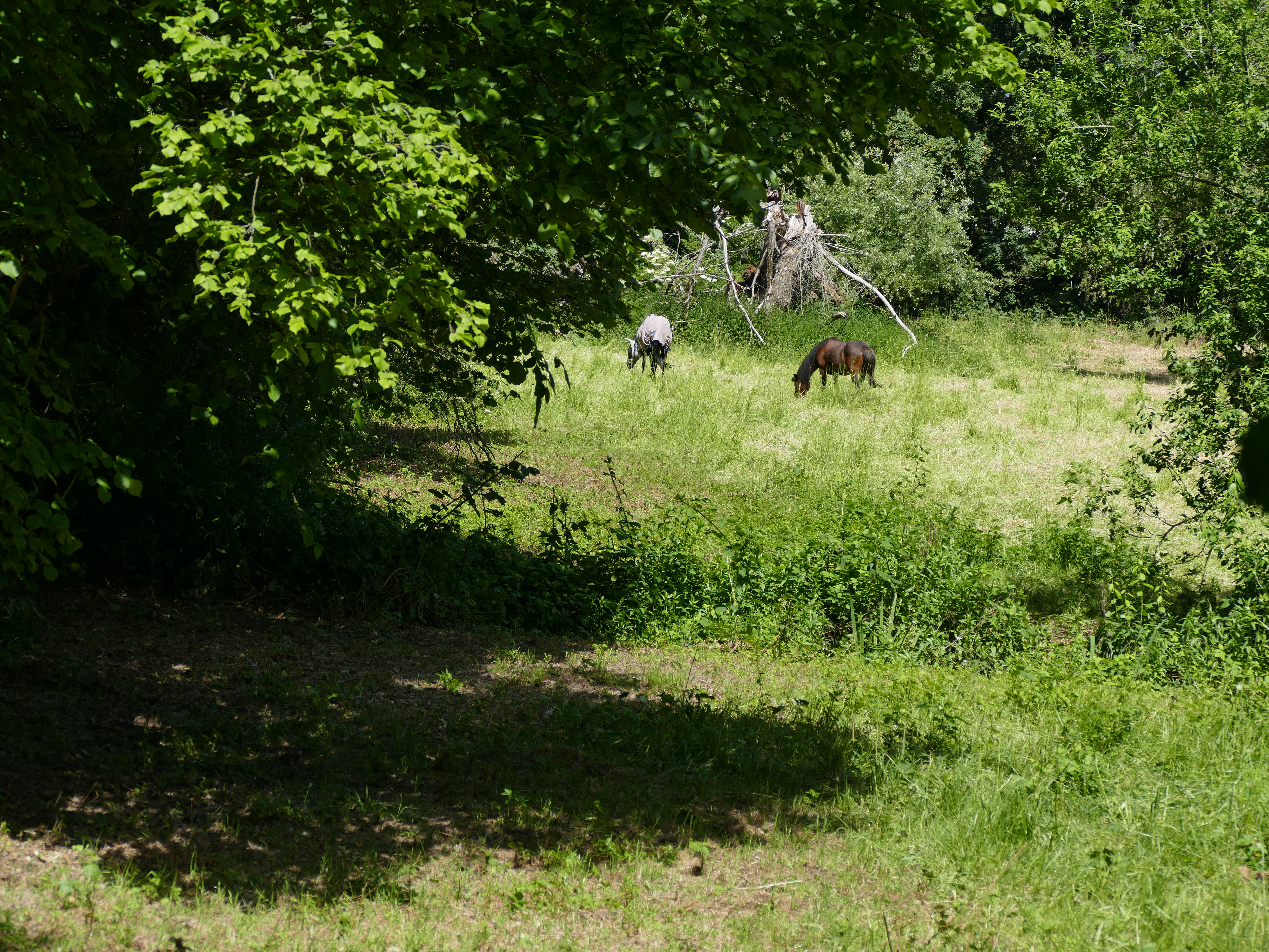 Naturschutzgebiet Seckbacher Ried in Frankfurt/Main, Pferde im Ried